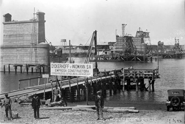 Construcción del Puente Ferrocarretero, Viedma-Patagones.